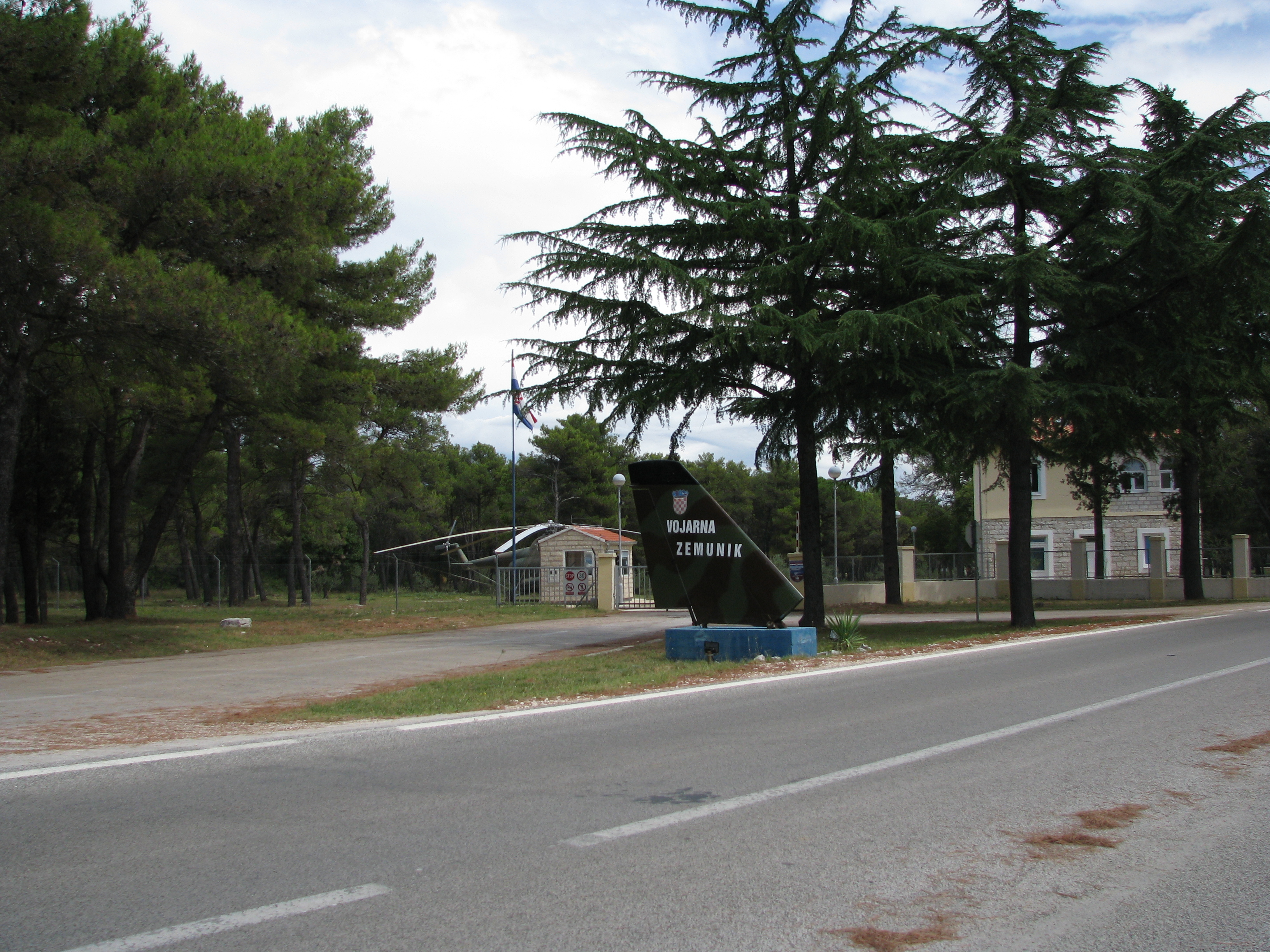 Ulaz u Vojarnu Zemunik kraj Zadra.